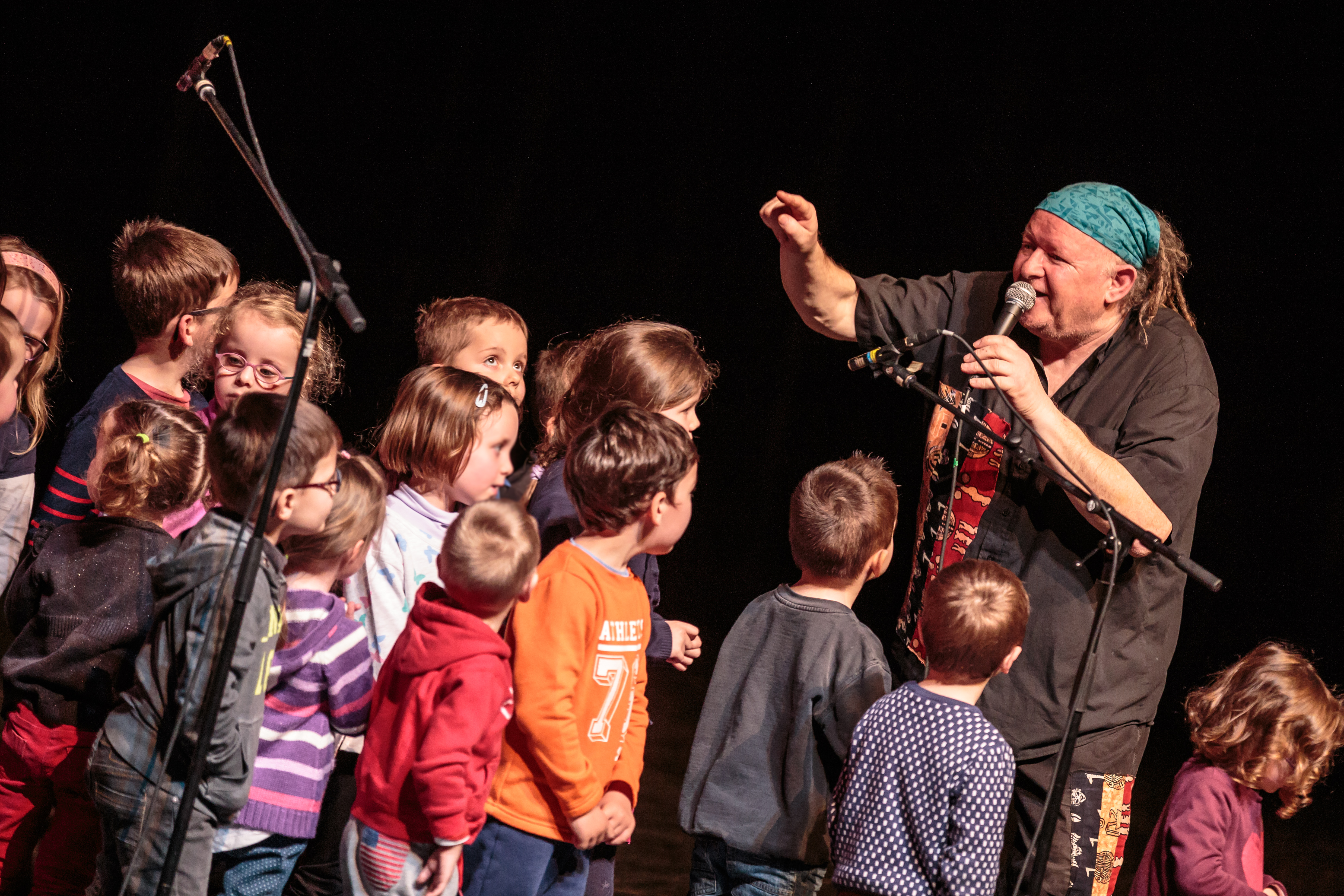 Concert de Jean Luc Roudaut le 22 avril 2016 pour et avec les enfants des classes bilingues de Landivisiau et Plouvorn ainsi que de Diwan pour le Breizhtival salle du Vallon à Landivisiau.